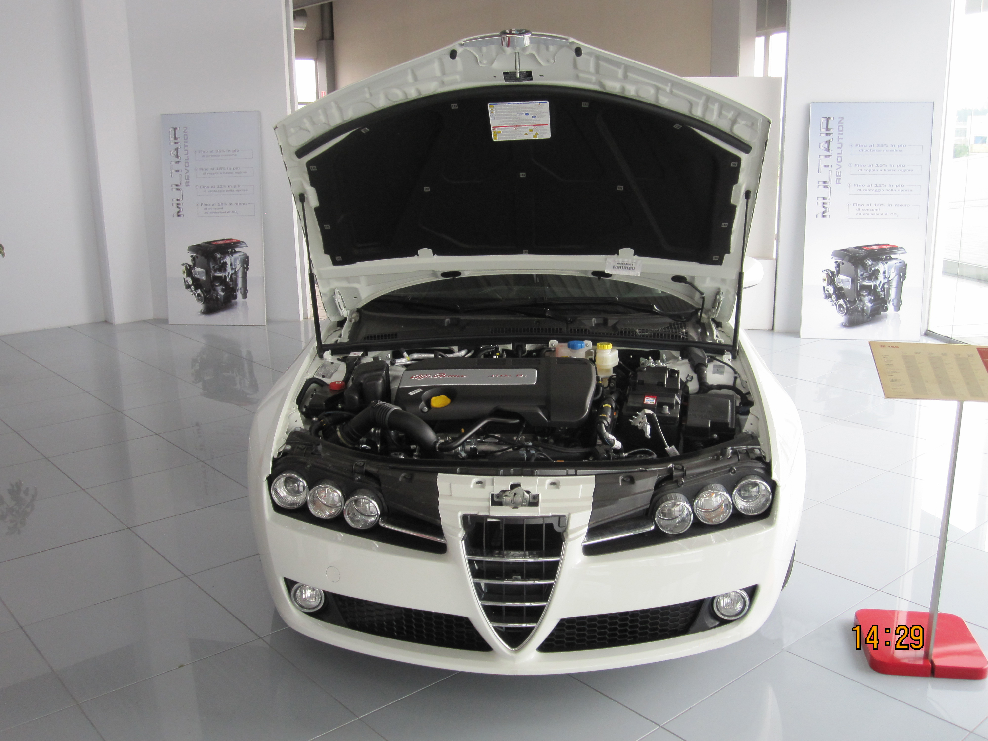 Alfa Romeo 159 with Alfa Romeo JTDm engine